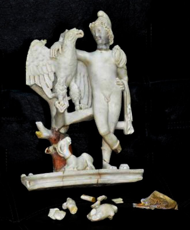 Image de la statuette de Ganymède retrouvée par les services du ministère de l'intérieur en Tunisie